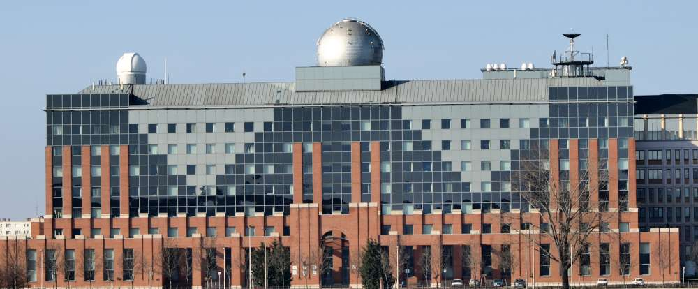 ELTE, északi épület, Lágymányos (Budapest, XI. ker., Pázmány Péter sétány)